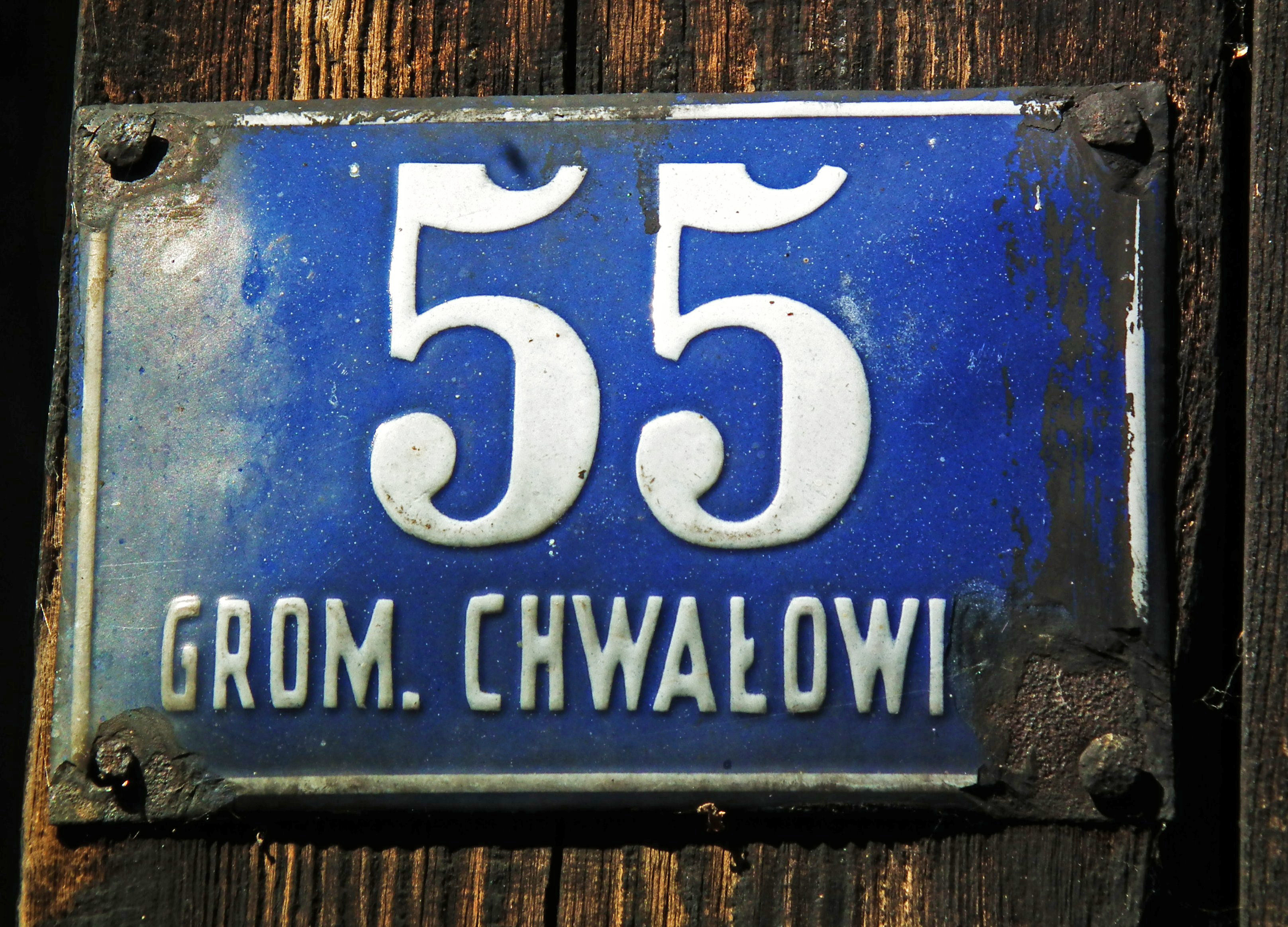 Kościół św. Antoniego Padewskiego w Chwałowicach.